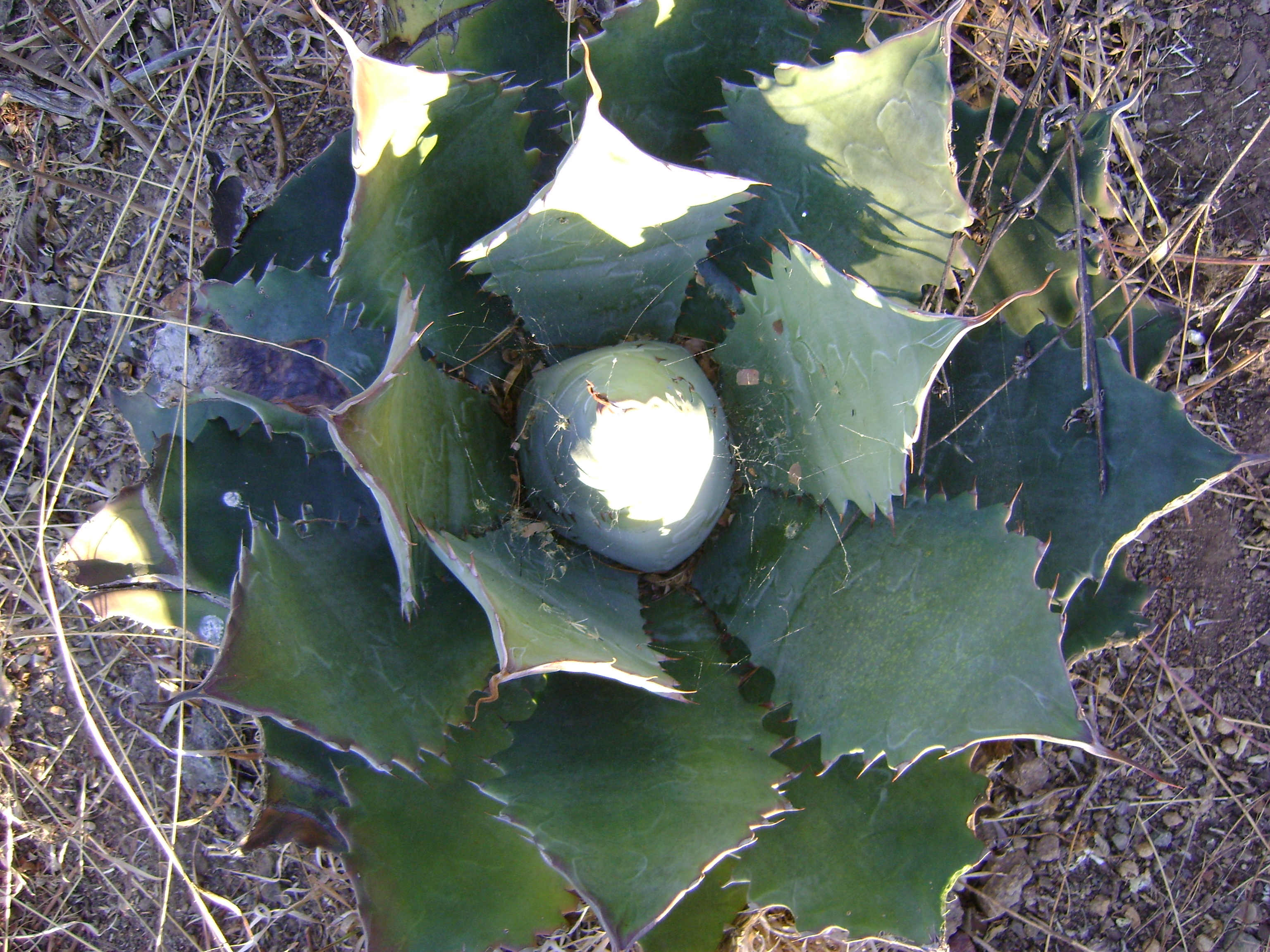 Tlacolula De Matamoros, Oaxaca